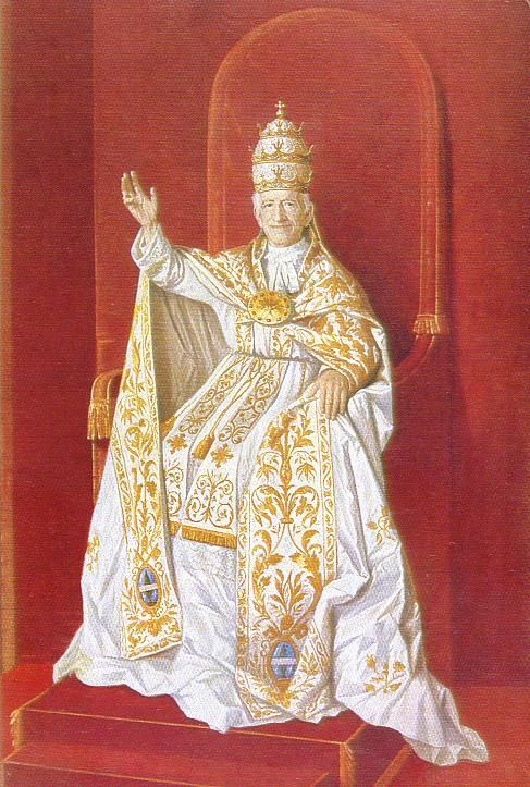 Pope Leo XIII